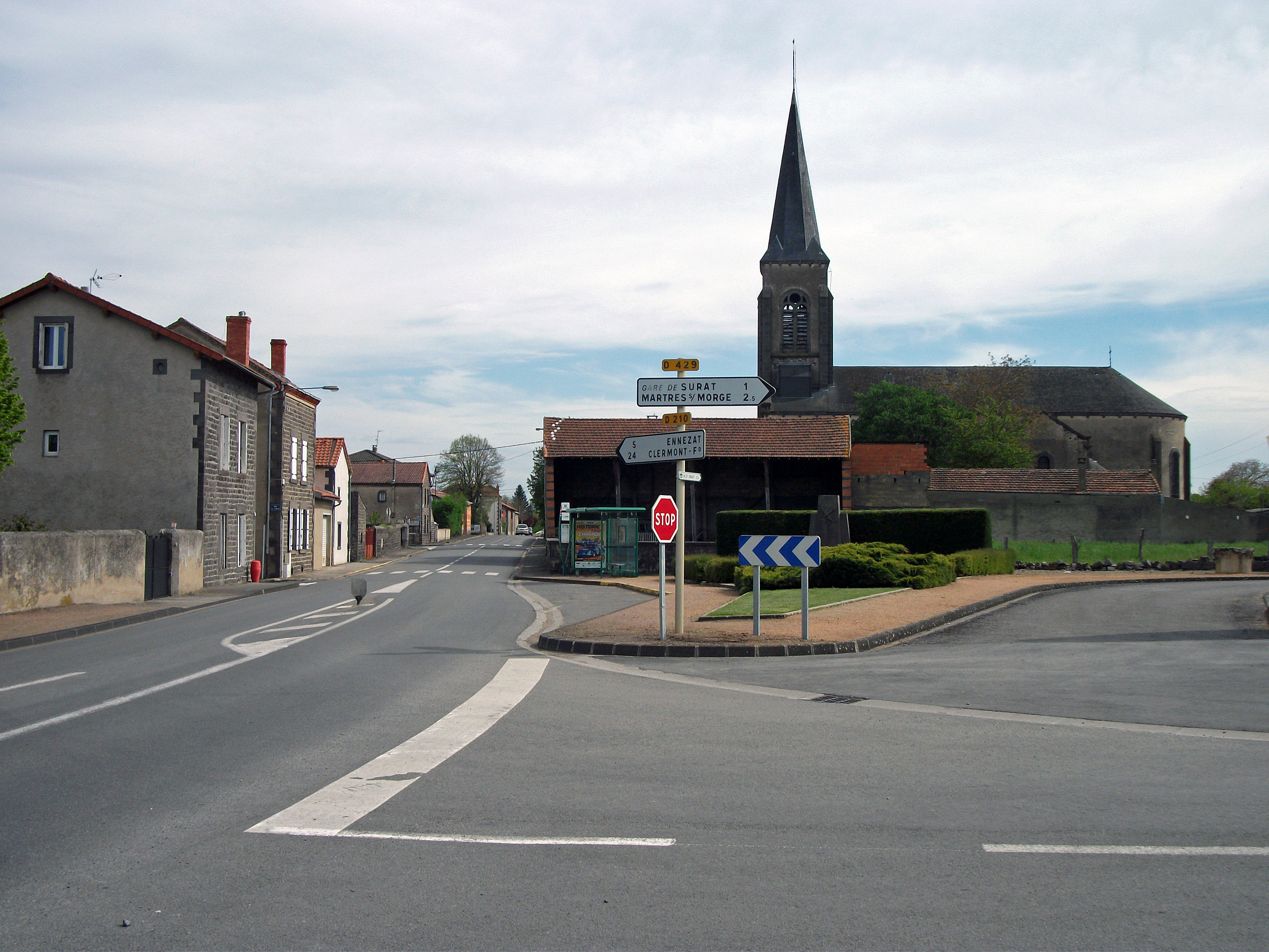 Departmental road 210 / Route départementale 210 en direction de Clermont-Ferrand, à Surat [10783]